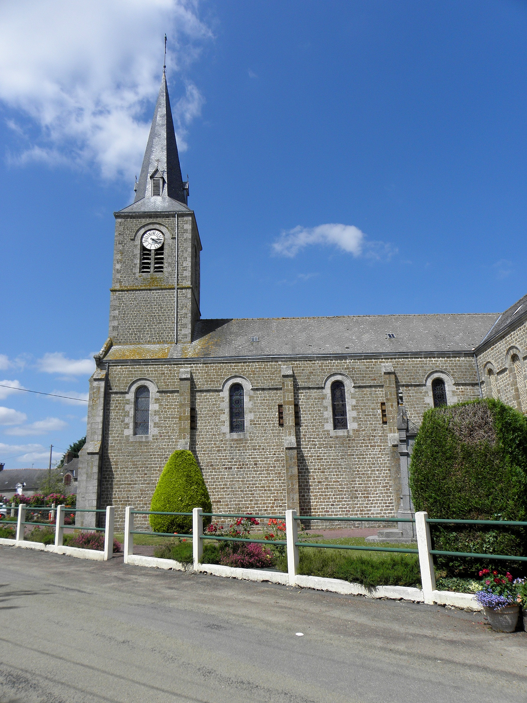 Église de Sainte-Marie-du-Bois (53).